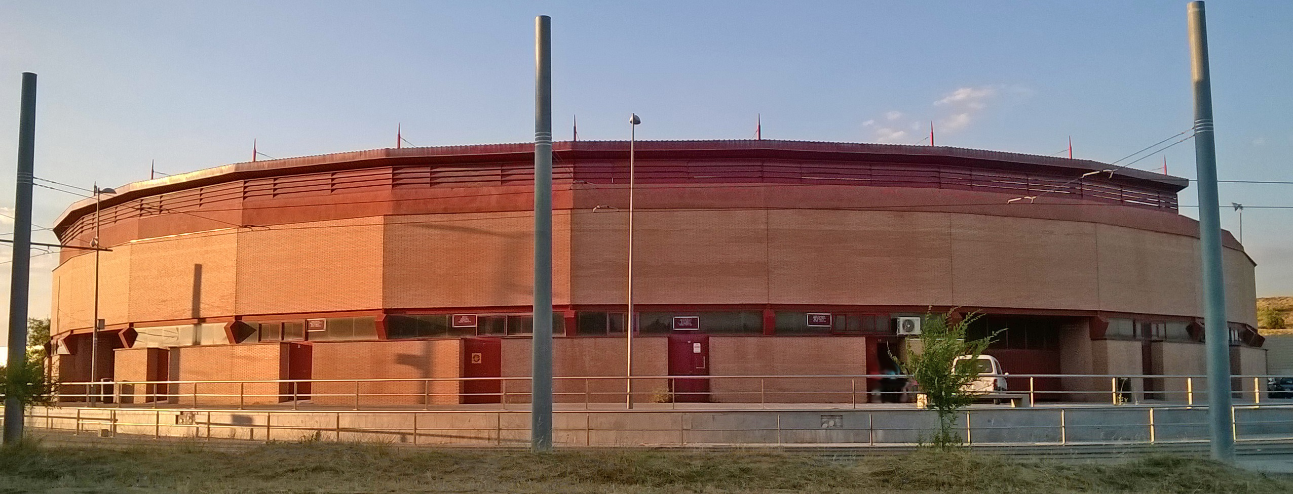 Plaza de Toros de Parla